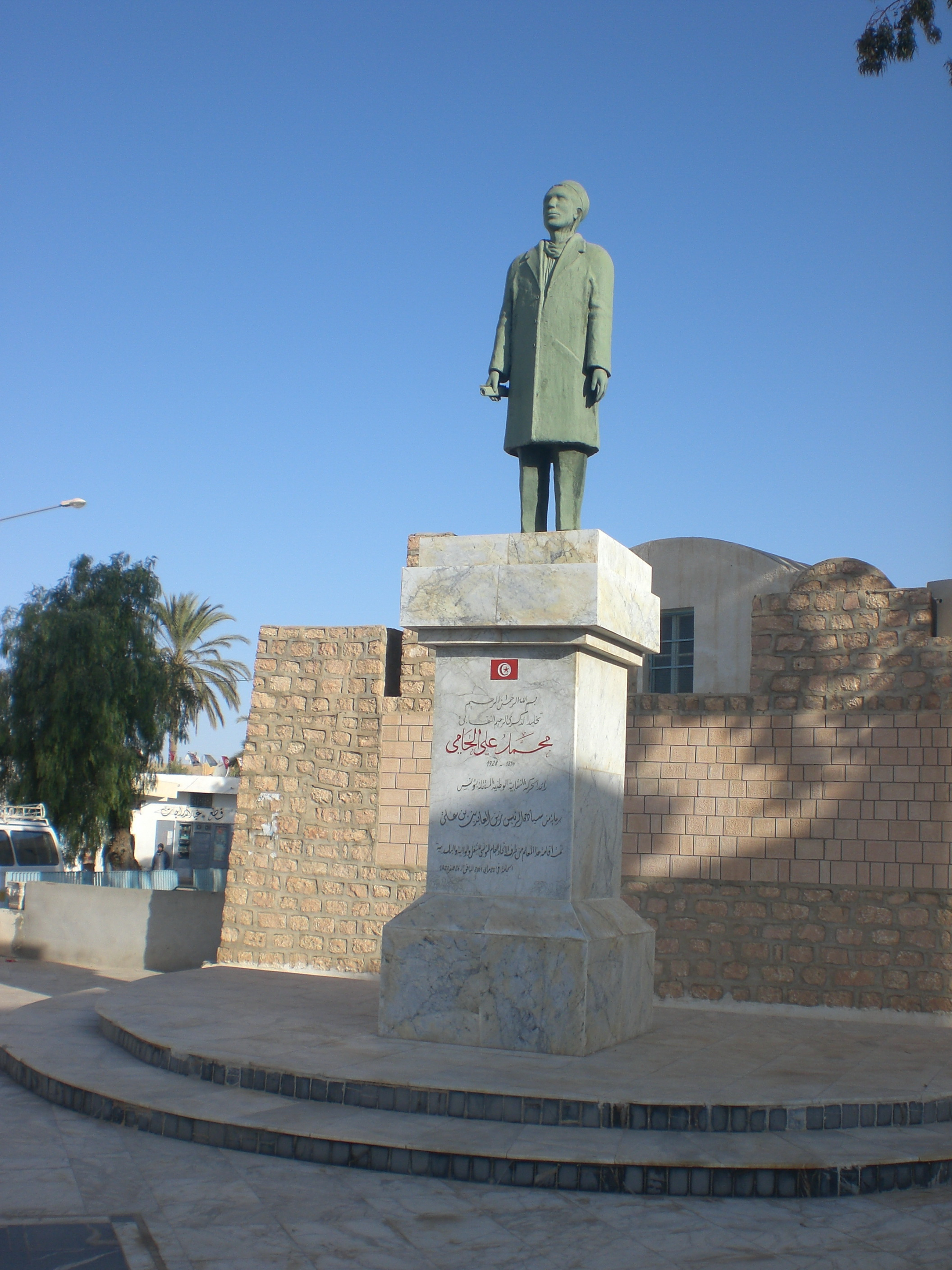 Statue de Momamed Ali El Hammi à El Hamma